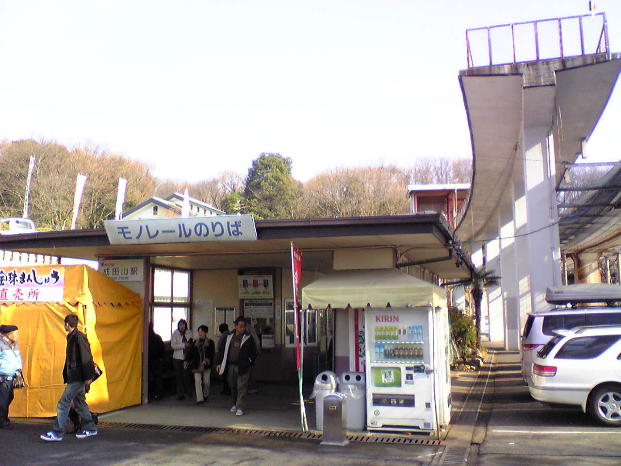 成田山駅。